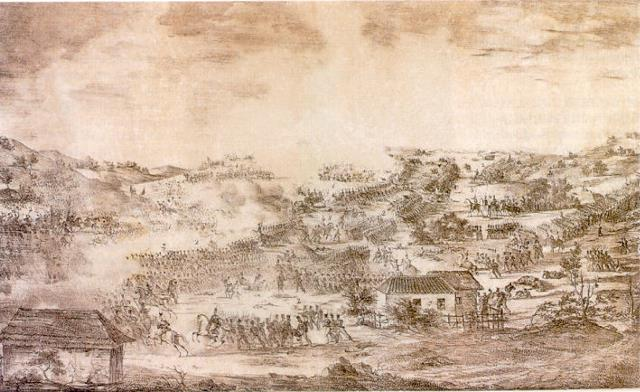 Batalla de Boyaca